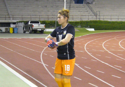 Yada Sengyong